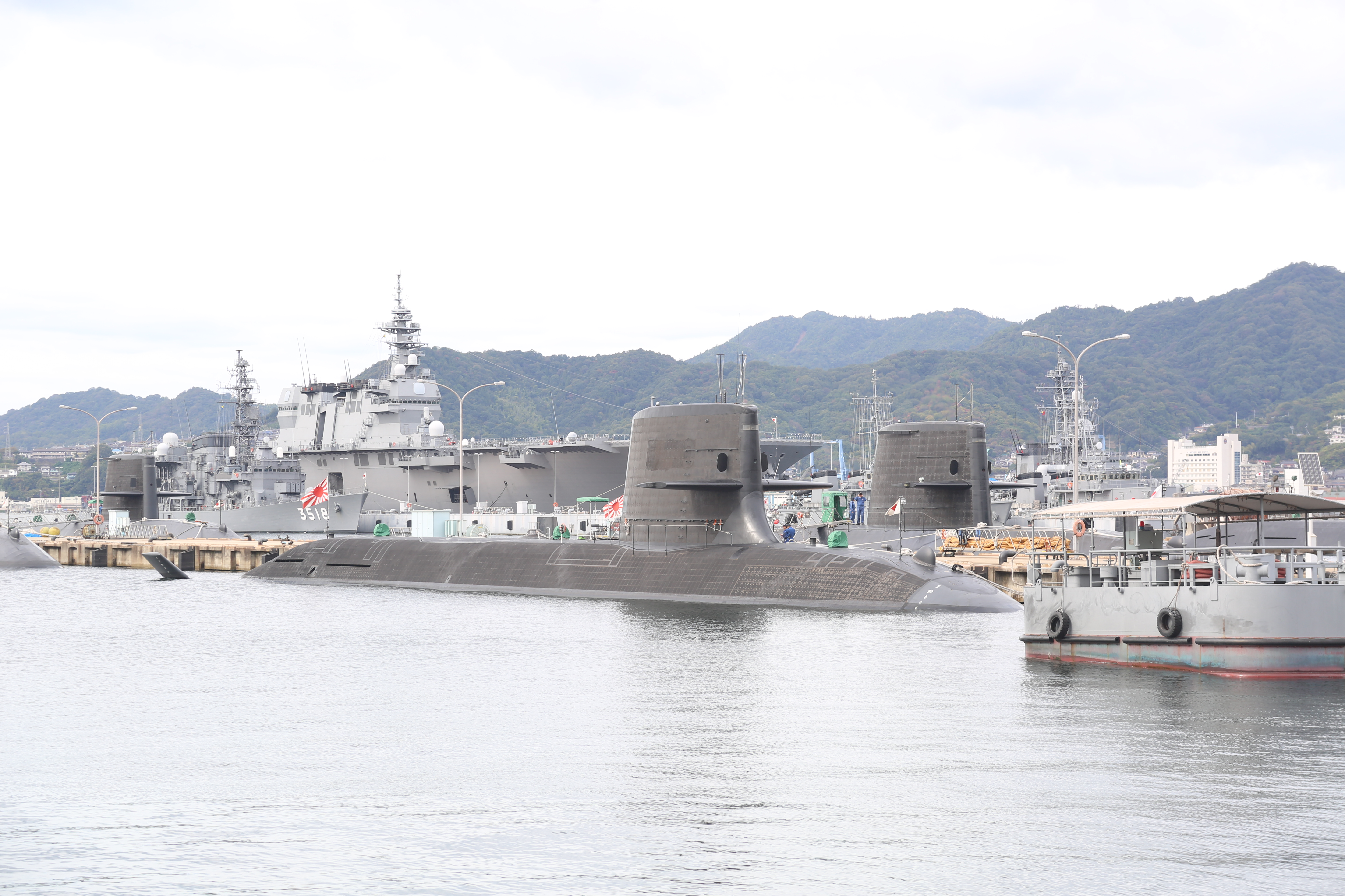 海上自衛隊呉基地に停泊する「そうりゅう」型潜水艦。2019年の撮影。艦名は不詳。奥は「かが」と練習艦「せとゆき」